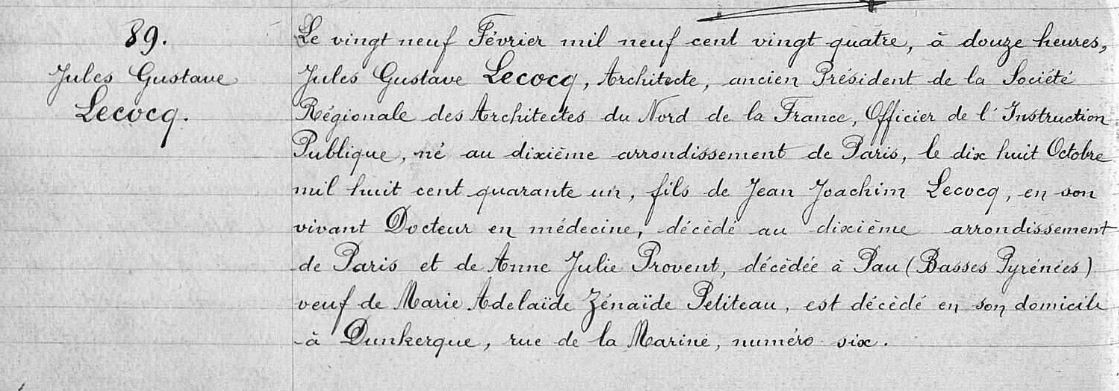 Acte de décès, mairie de Dunkerque, N°89 1924